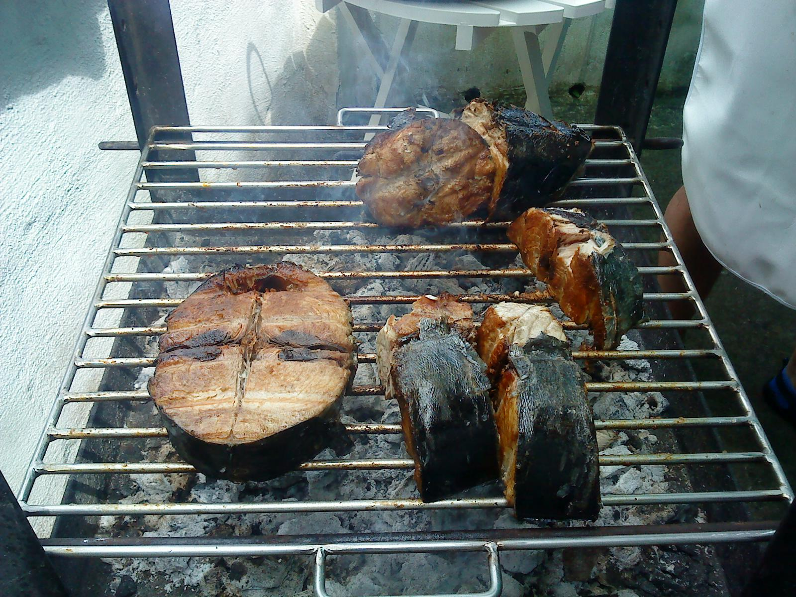 Preparación de bonito asado a la parrilla (ojael) en Ondarroa Bizkaia País Vasco (España).